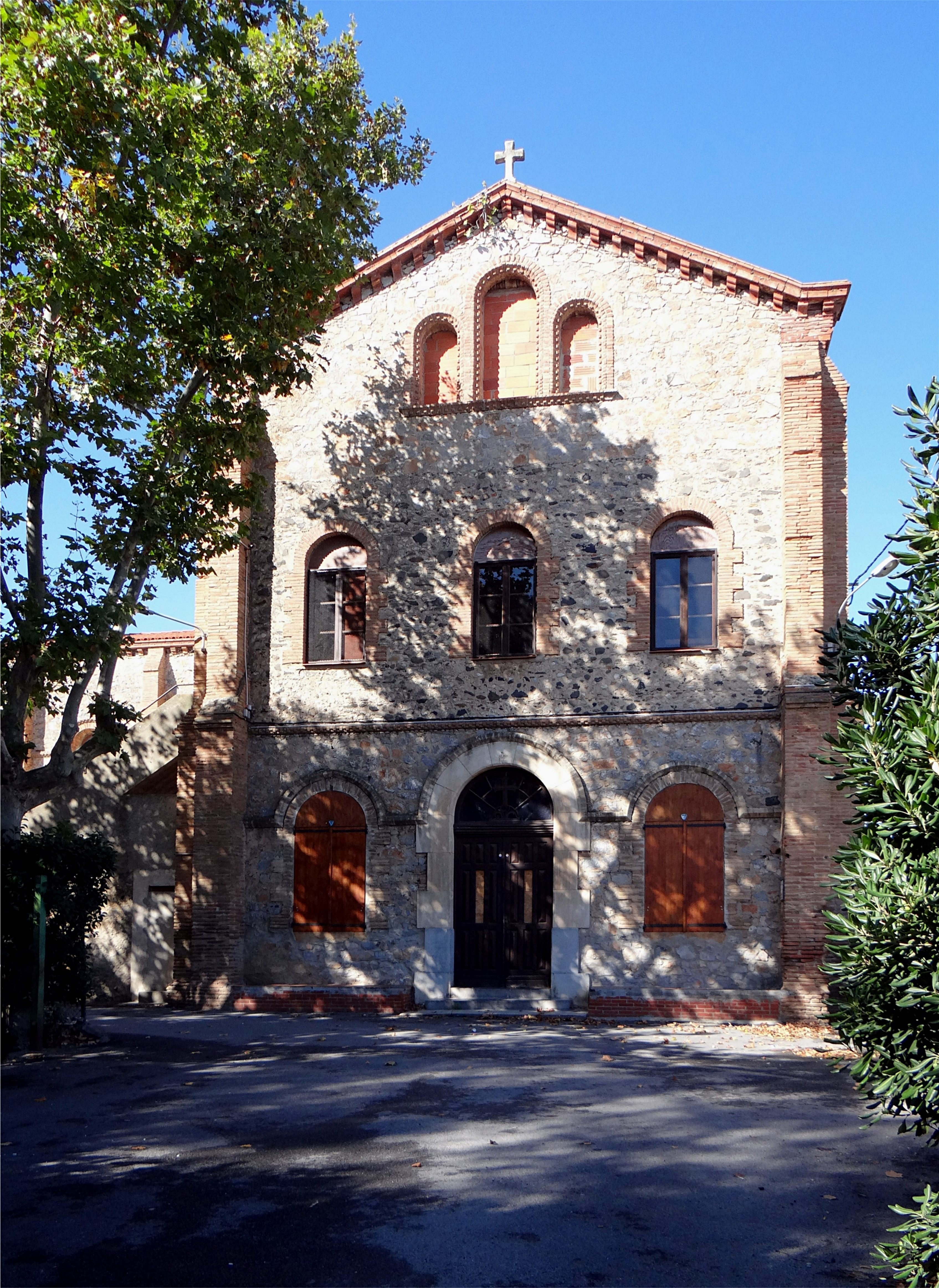 Entrée du collège Notre-Dame des Anges, Espira-de-l'Agly, Pyrénées-Orientales, France.